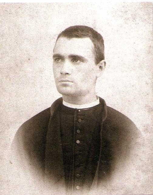 Tomàs Monserrat Ginard, (Llucmajor, Mallorca, 1873-1944), prevere i fotògraf mallorquí.